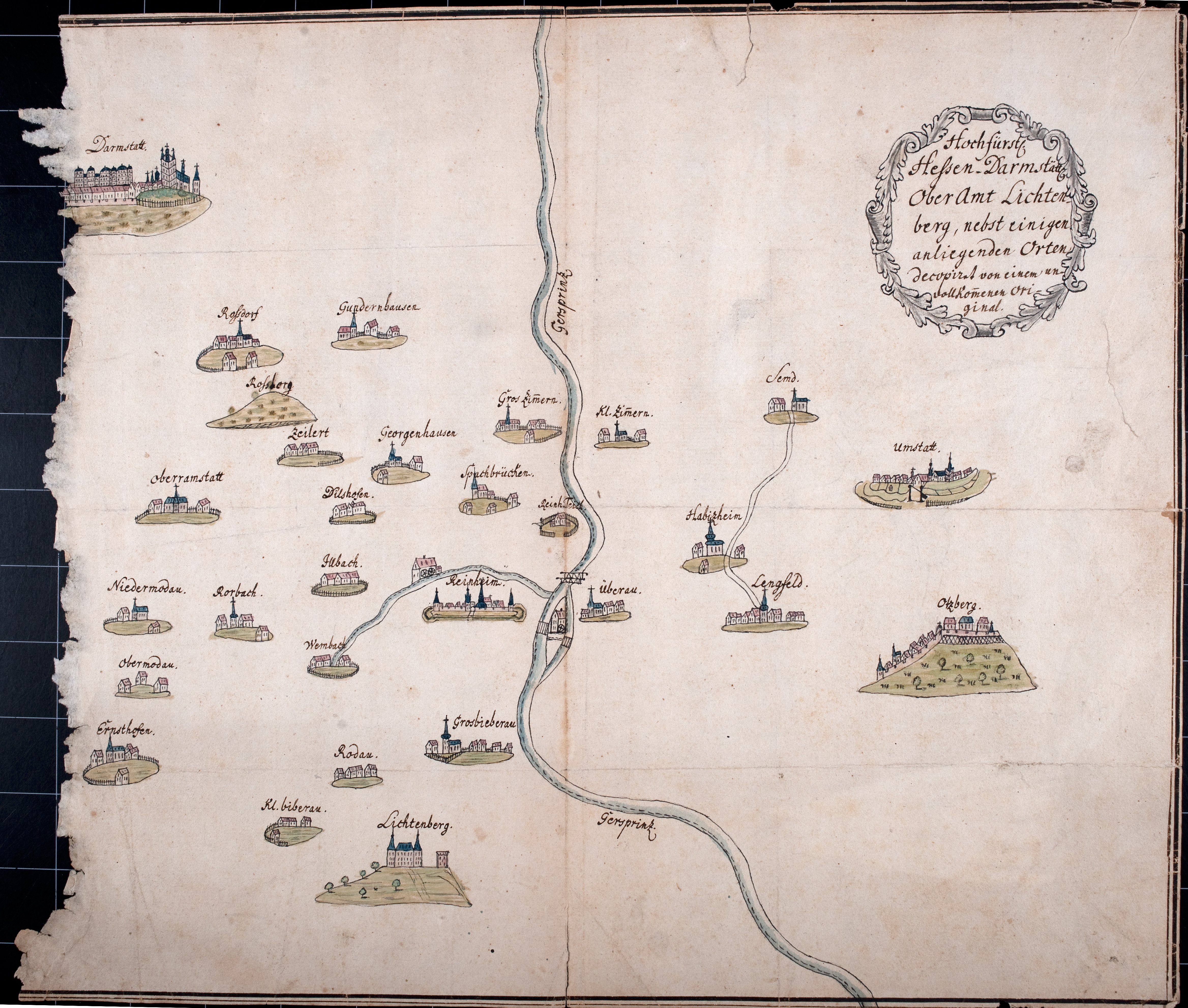 Karte des Oberamts Lichtenberg mit Ansichten von Umstadt, Otzberg, Lengfeld, Habitzheim, Semd, Klein-Zimmern, Ueberau, Groß-Zimmern, Reinheimer Teich, Reinheim, Spachbrücken, Groß-Bieberau, Lichtenberg, Rodau, Klein-Bieberau, Wembach, Illbach, Dilshofen, Georgenhausen, Gundernhausen, Roßdorf, Zeilhard, Rohrbach, Ernsthofen, Ober-Modau, Ober-Ramstadt, Darmstadt, Mitte 18. Jahrhundert (Hessisches Staatsarchiv Darmstadt P 1 nr. 1319) Zum Archivale